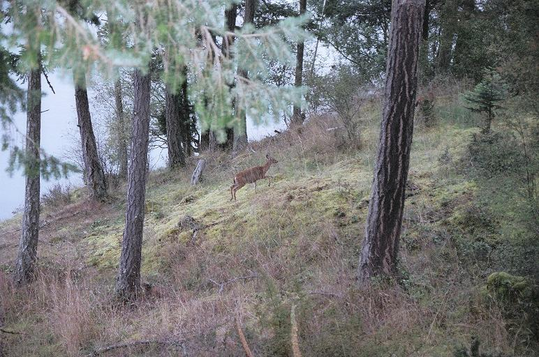 deklivo apudmara en insulo Shaw, kun cervino